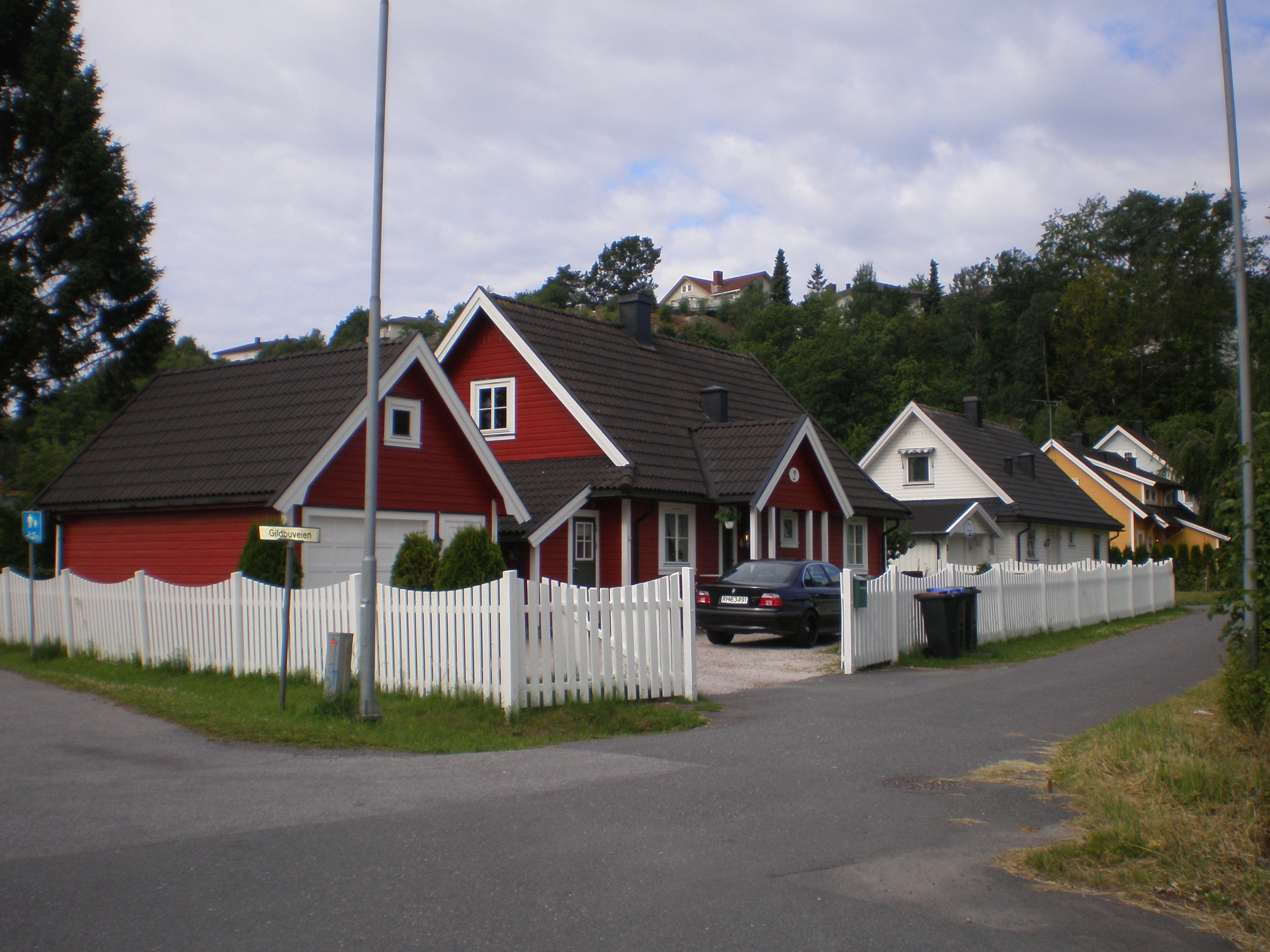 Sandefjord, Norwegia